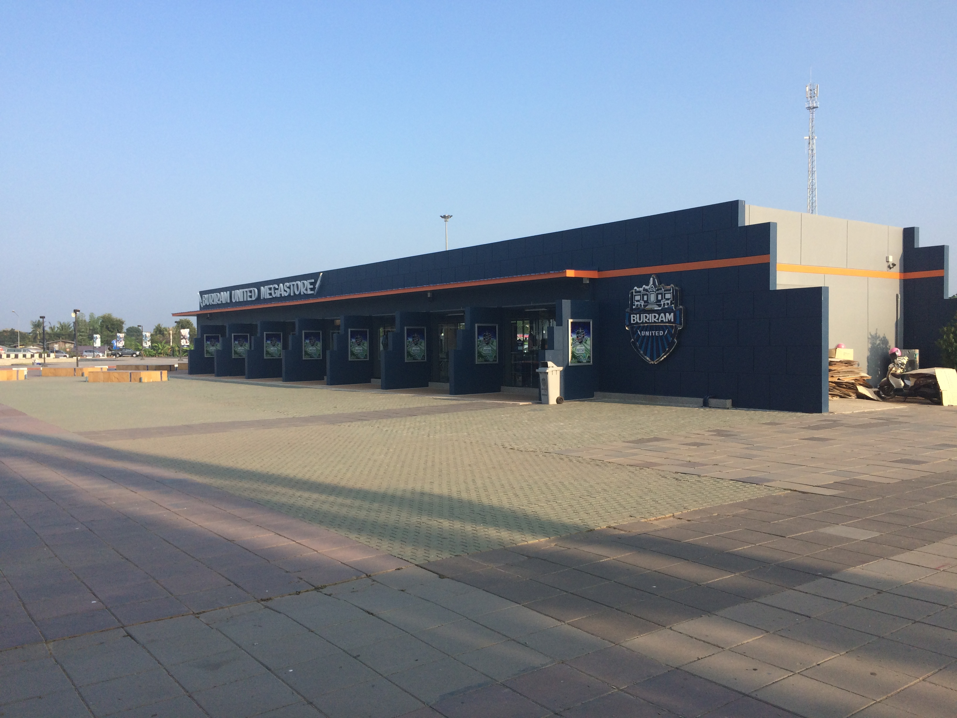 Isan, Mueang Buri Ram District, Buri Ram 31000, Thailand